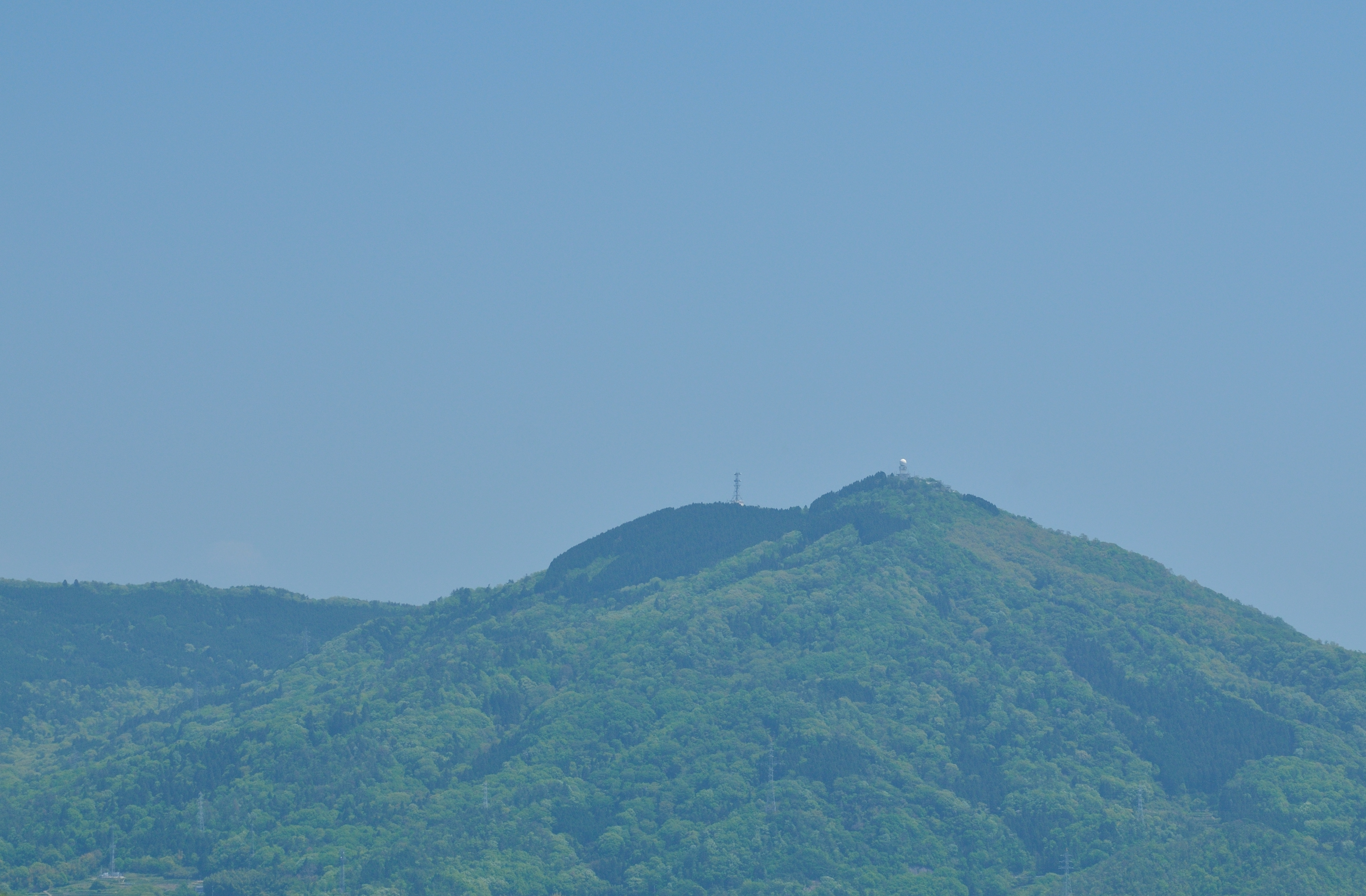 広島県呉市の山である灰ヶ峰です。広島市の絵下山より撮影したものです